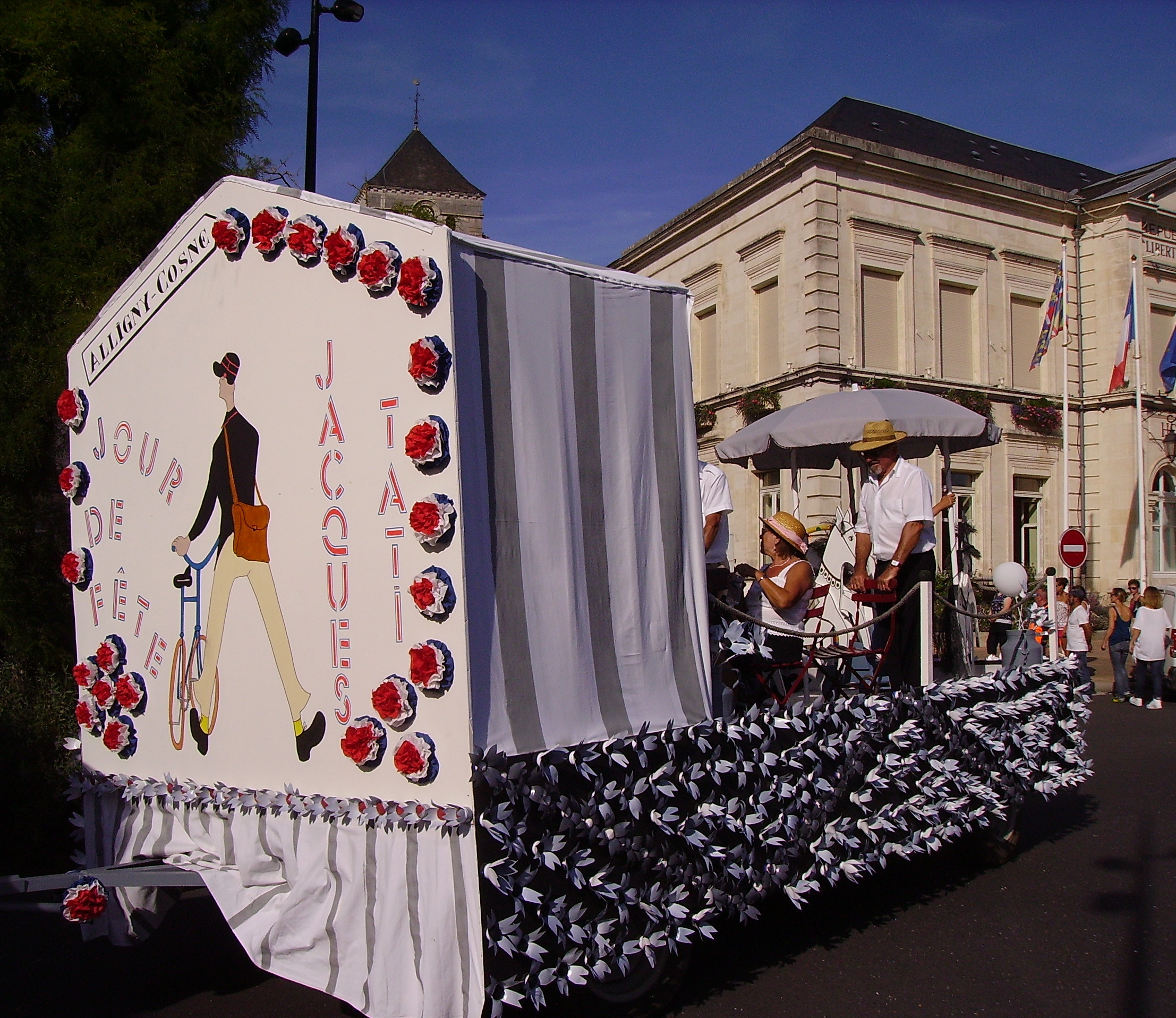 Char (confectionné en produits recyclés) réalisé par la commune d'Alligny-Cosne sur le film Jour de fête de Jacques Tati (1949). Char situé au carrefour giratoire près du cinéma de Cosne-Cours-sur-Loire.